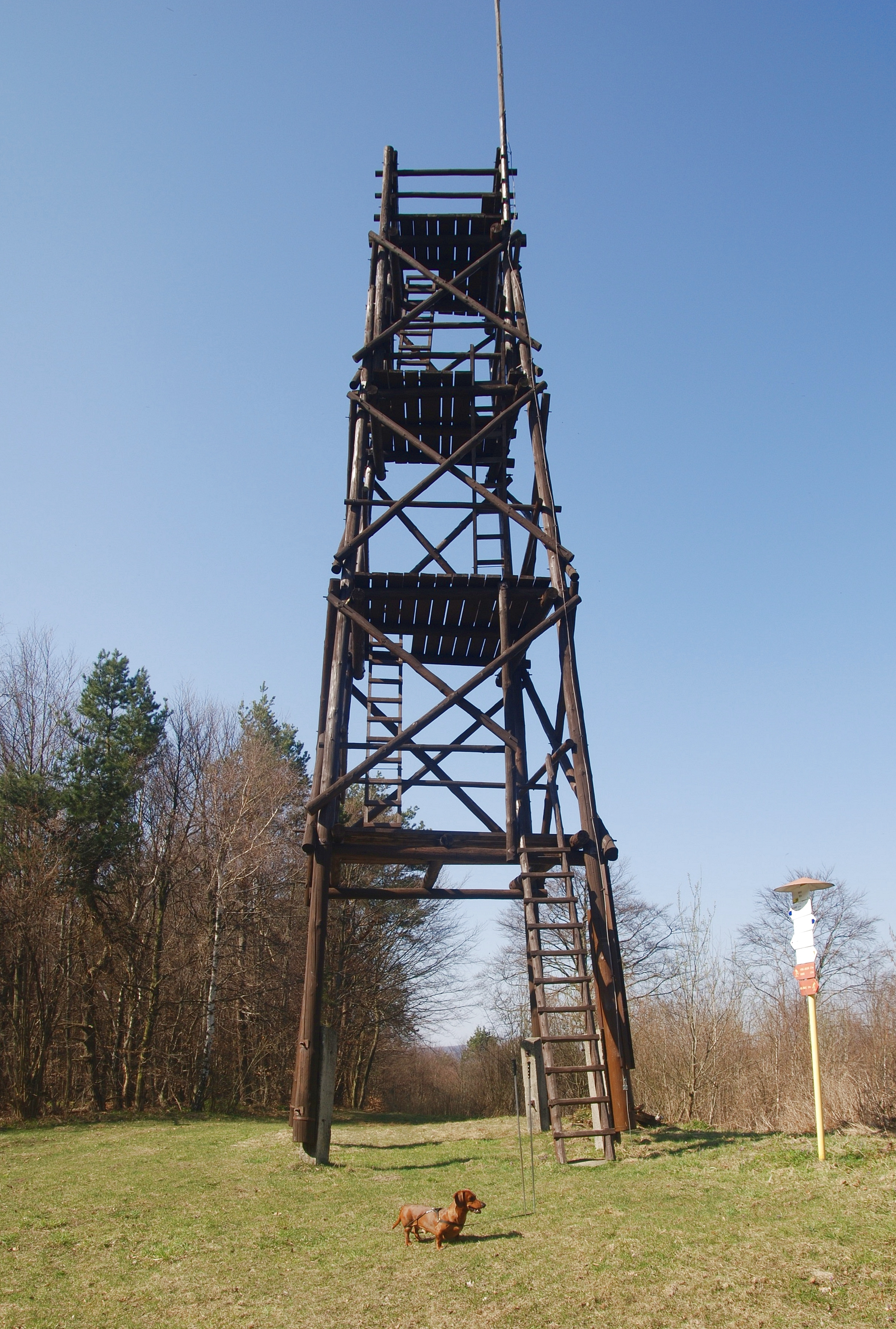 Pogórze Ondawskie